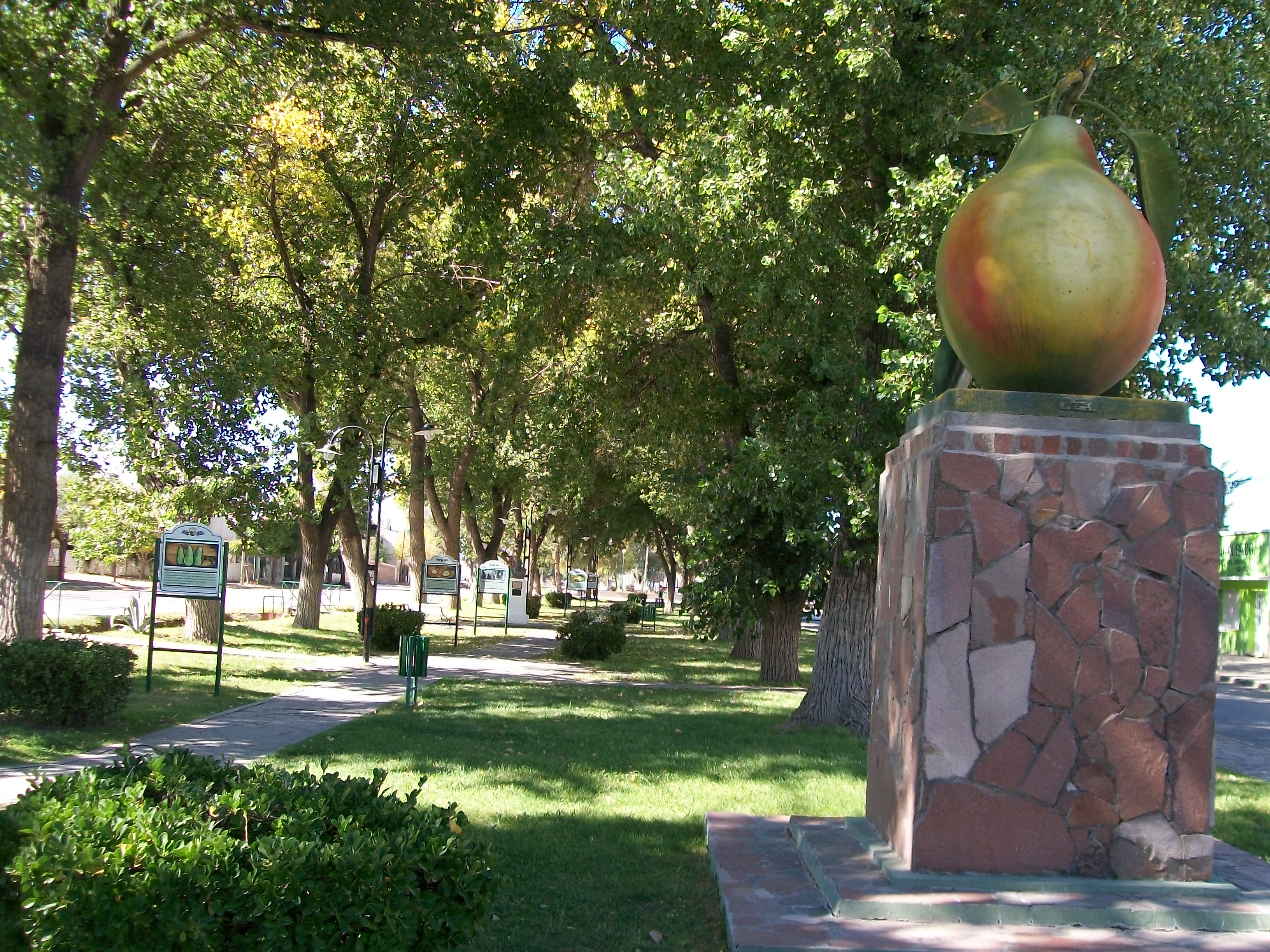 Plazoleta Restituta Méndez ubicada en la avenida Libertad entre las calles L N Alem y B Mitre, localidad de Allen, provincia de Río Negro, Argentina. La Plazoleta tiene el Monumento a la Pera y el Paseo de la Producción, con carteles informativos sobre las distintas variedades de pera. El Monumento fue inaugurado en agosto de 2007. Restituta Méndez fue la primera maestra de la localidad. Comenzó a dictar clases en marzo de 1910 en la escuela Nº 37, que hoy en día es la escuela Nº 23. Más información Inauguración Monumento y Paseo Historia Escuela Nº23